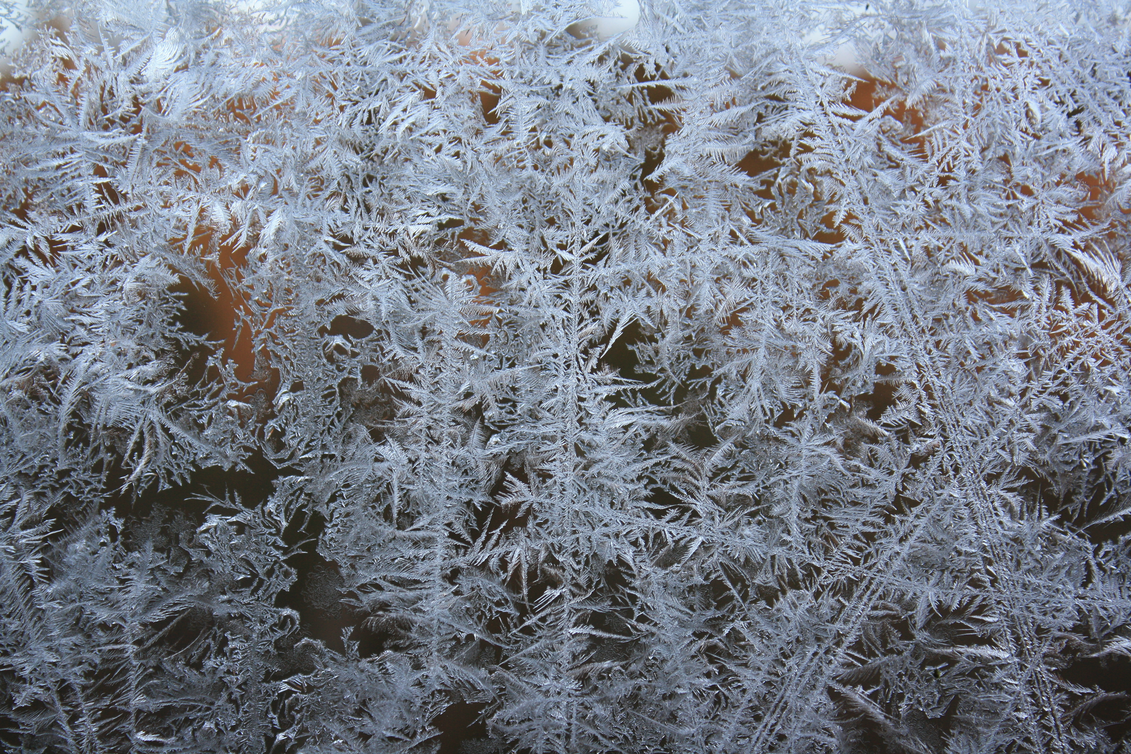 Eisblume an einer Glasscheibe